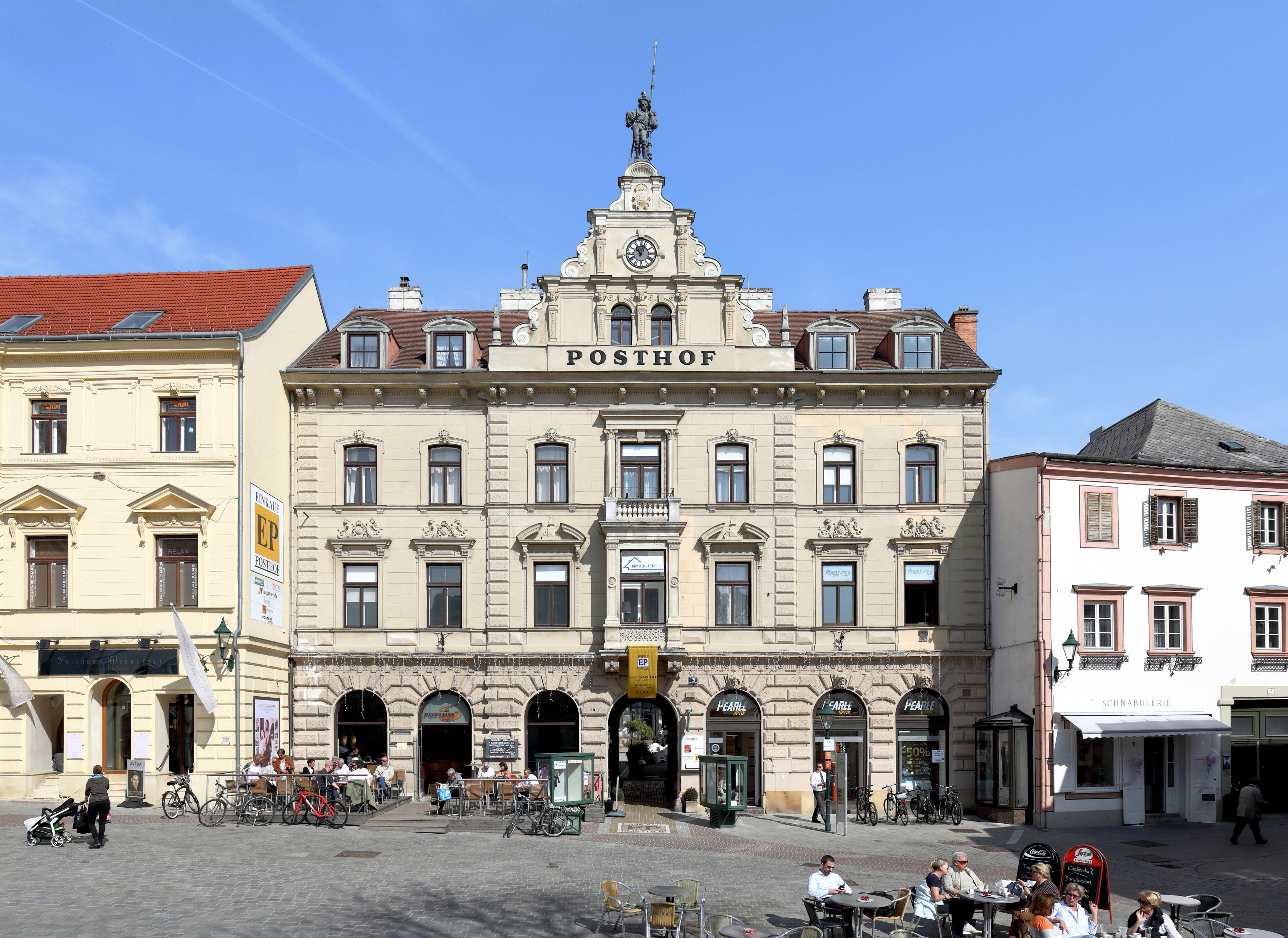 Der sogenannt Posthof am Schrannenplatz in der niederösterreichischen Bezirkshauptstadt Mödling.Ein repräsentatives späthistoristisches dreigeschossiges Geschäfts- und Wohnhaus das 1879 von dem Architekten Eugen Sehnal an Stelle des ehemaligen Markthauses errichtet wurde.